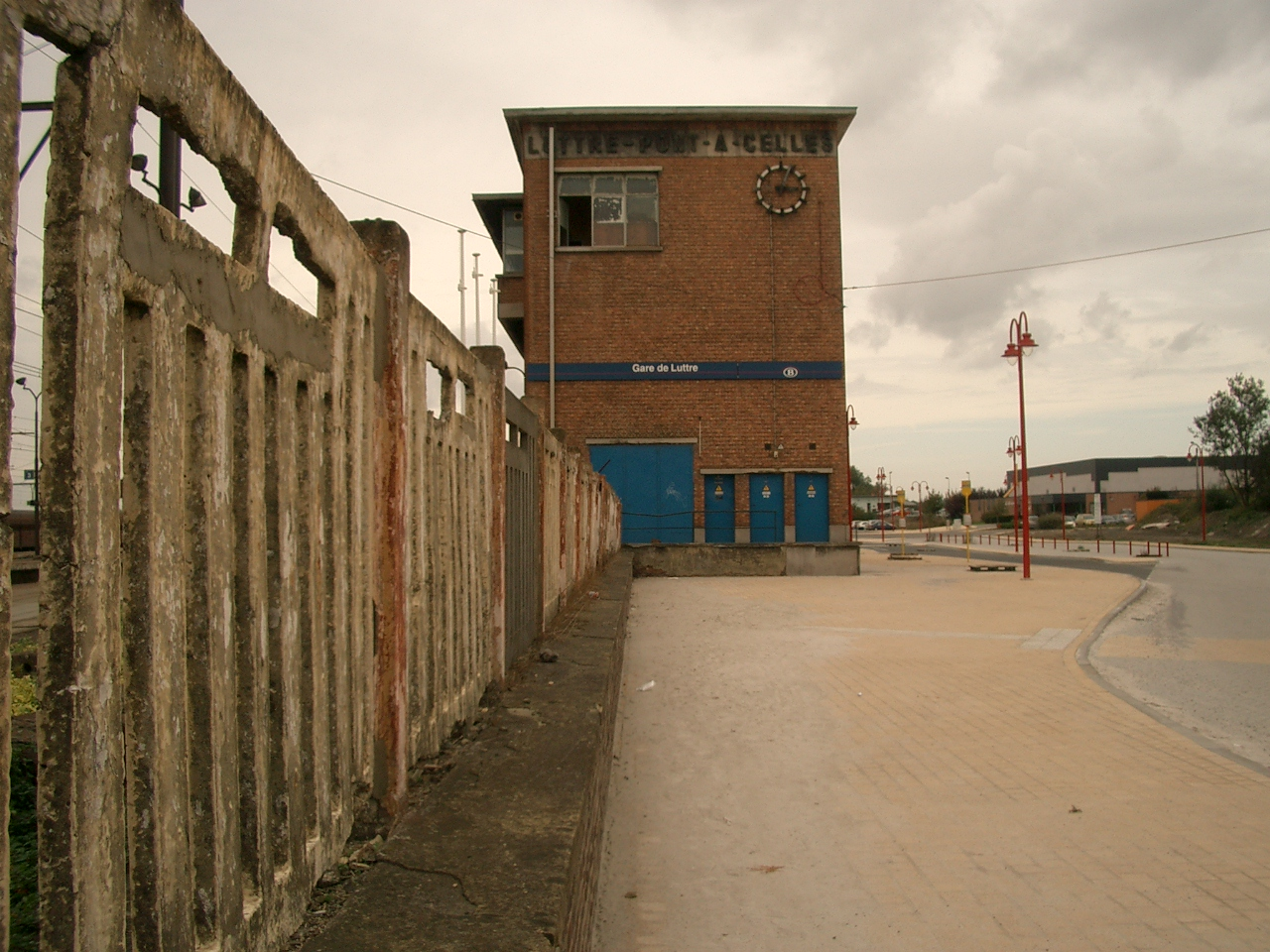 Luttre Station